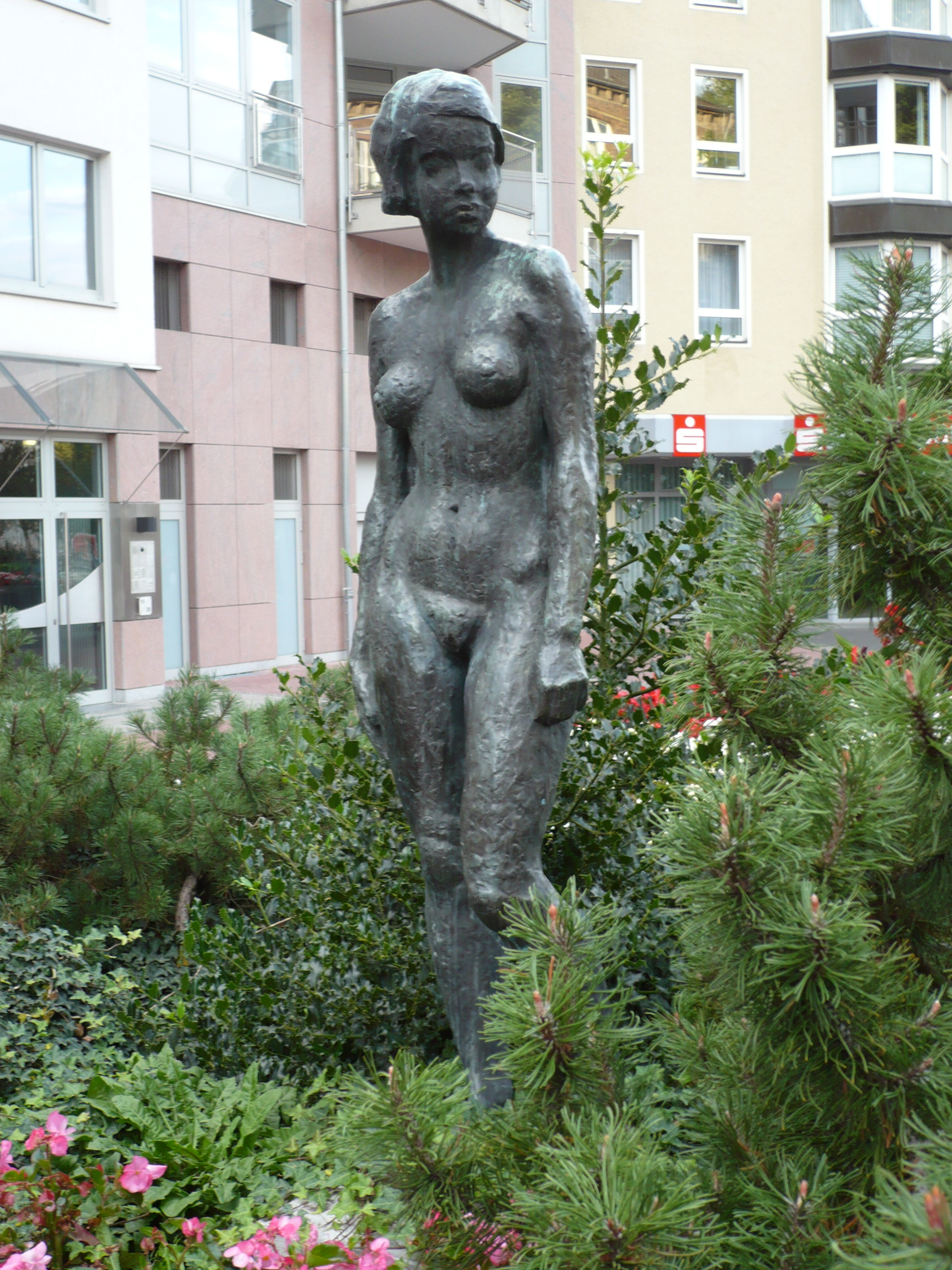 Mädchenplastik von Helmuth Schepp, Professor für Plastik an der RWTH und Bildhauer in Aachen (1894-1982). Die Bronzestatue steht am Burtscheider Markt in Aachen-Burtscheid. Sie ist der Zweitguß eines Exponates aus dem Suermondt-Museum.